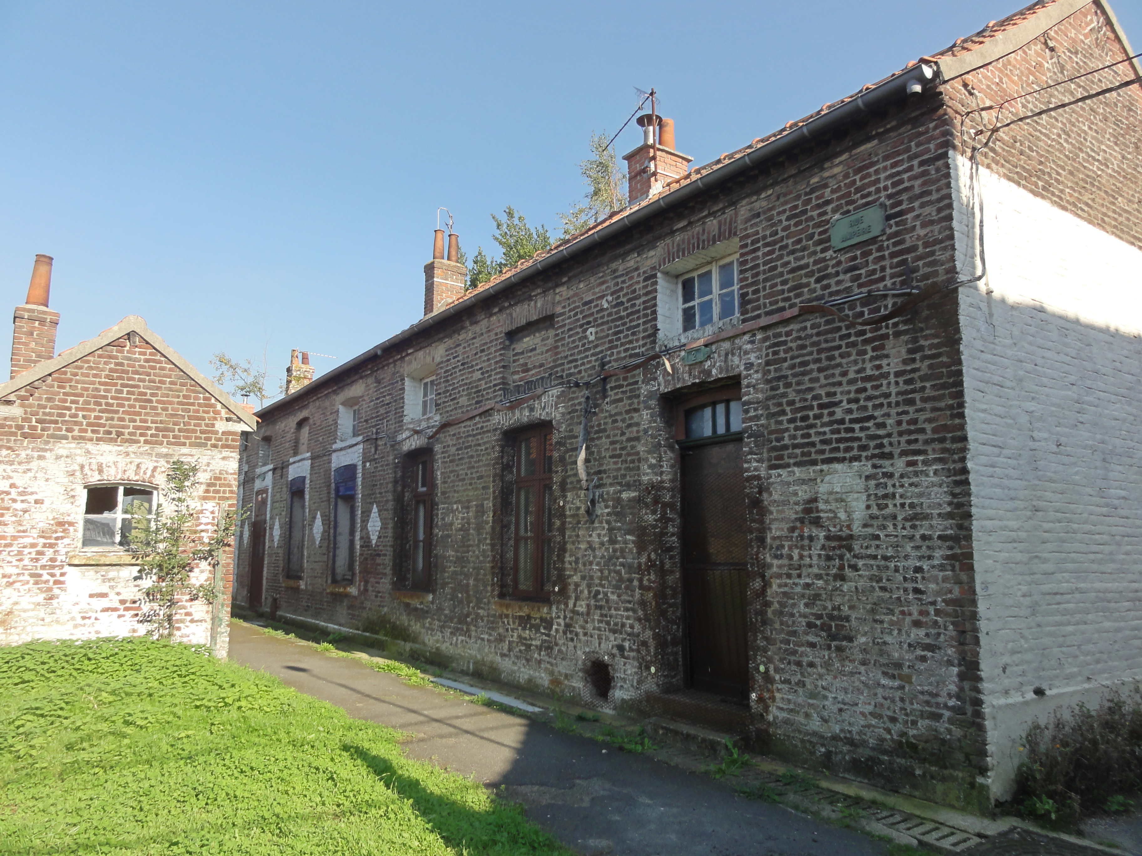 Cité des Électriciens ou no 2 de la Fosse n° 1 - 1 bis de la Compagnie des mines de Bruay, Bruay-la-Buissière, Pas-de-Calais, Nord-Pas-de-Calais, France. .